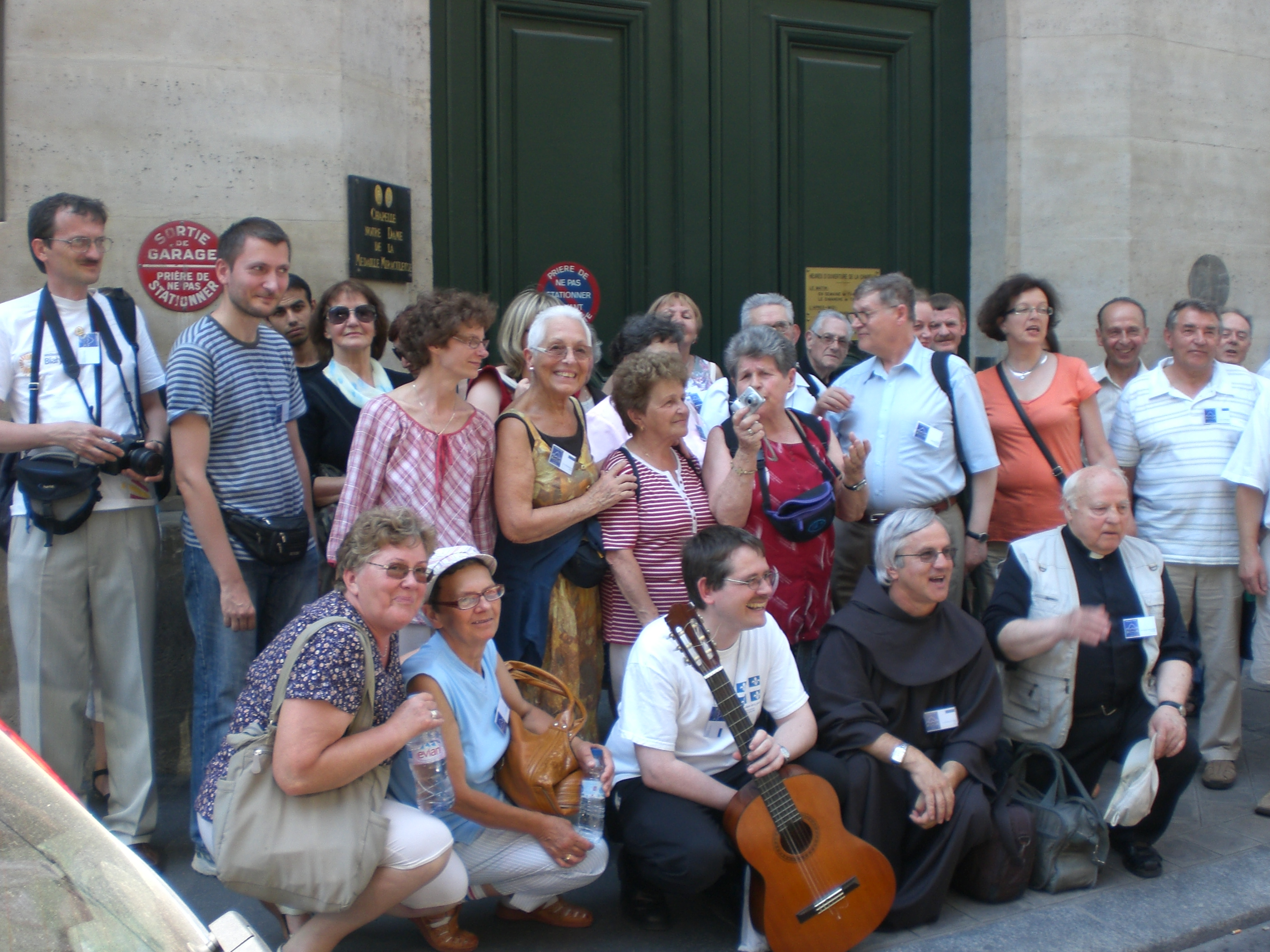 Partoprenantoj de la IKUE-Kongreso 2010 en Parizo (27-a de junio ĝis la 3-a de julio 2010) antaŭ la Kapelo de la Mirakla Medalo